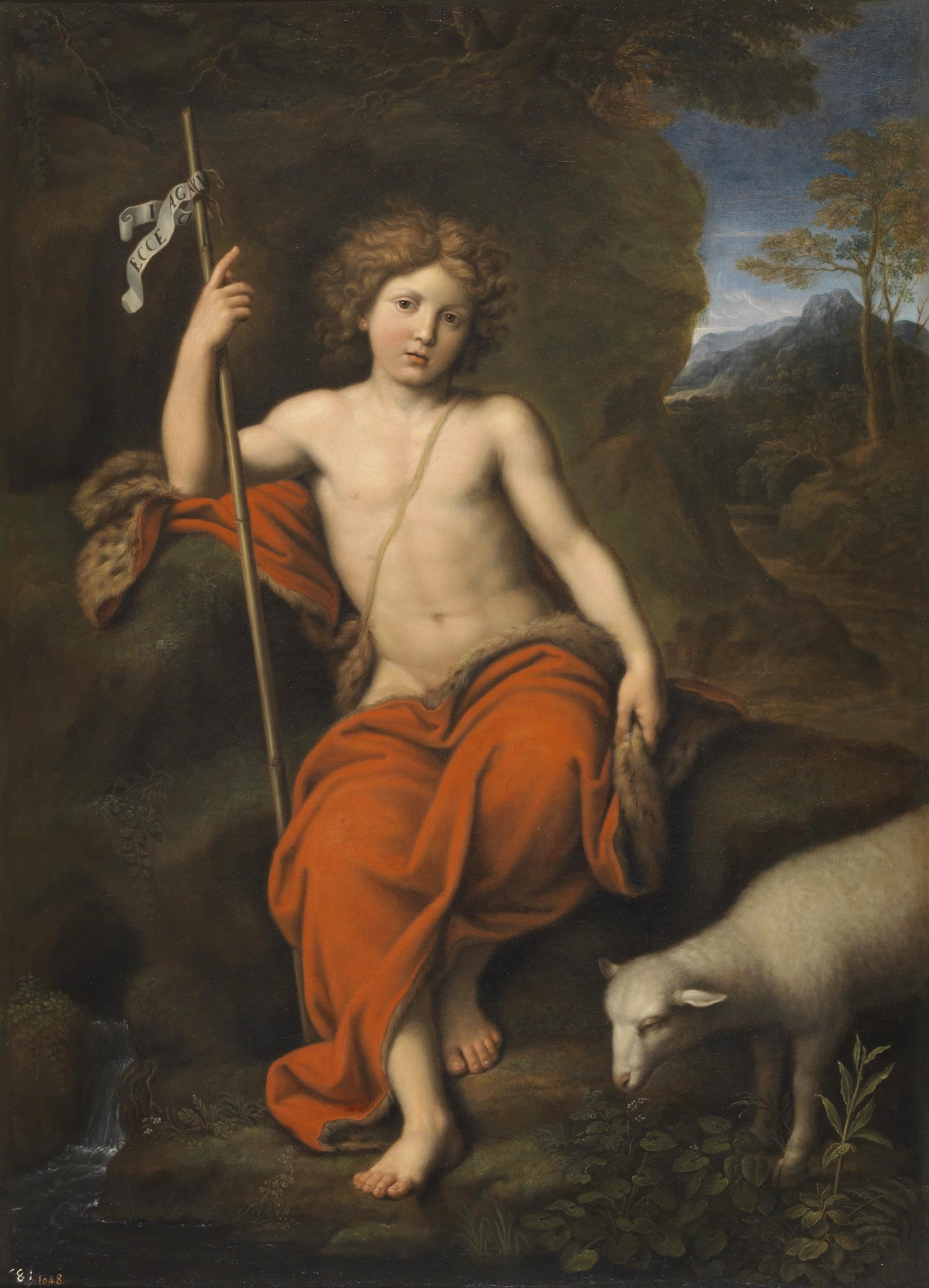 La obra muestra al profeta San Juan Bautista, precursor del Mesías.